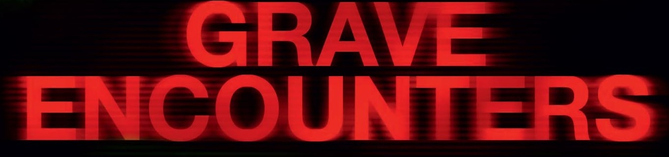 Logo des Films Grave Encounters